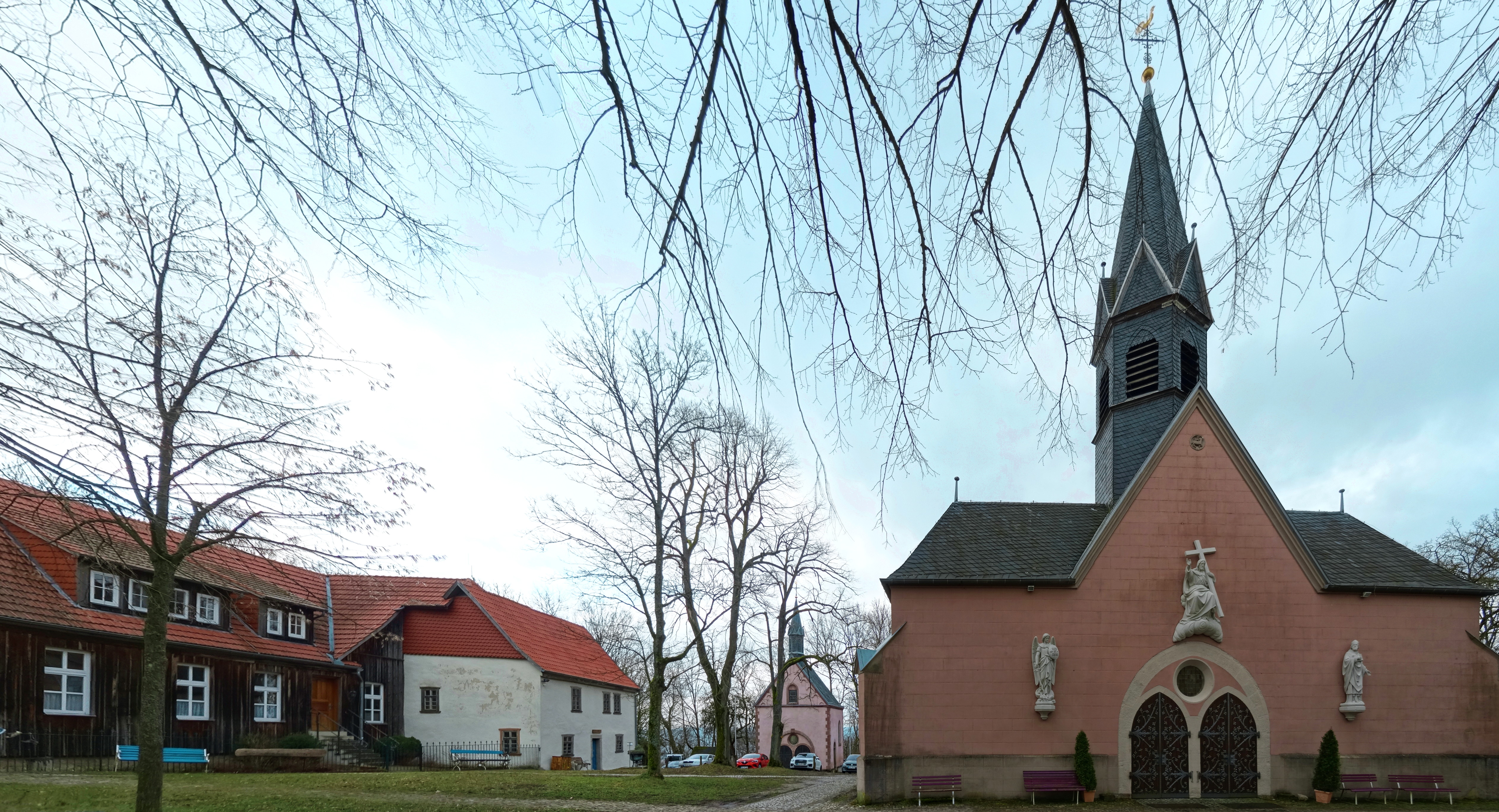 Franziskanerkloster, Bonifatiuskapelle und Erlöserkirche St. Salvator auf dem Hülfensberg